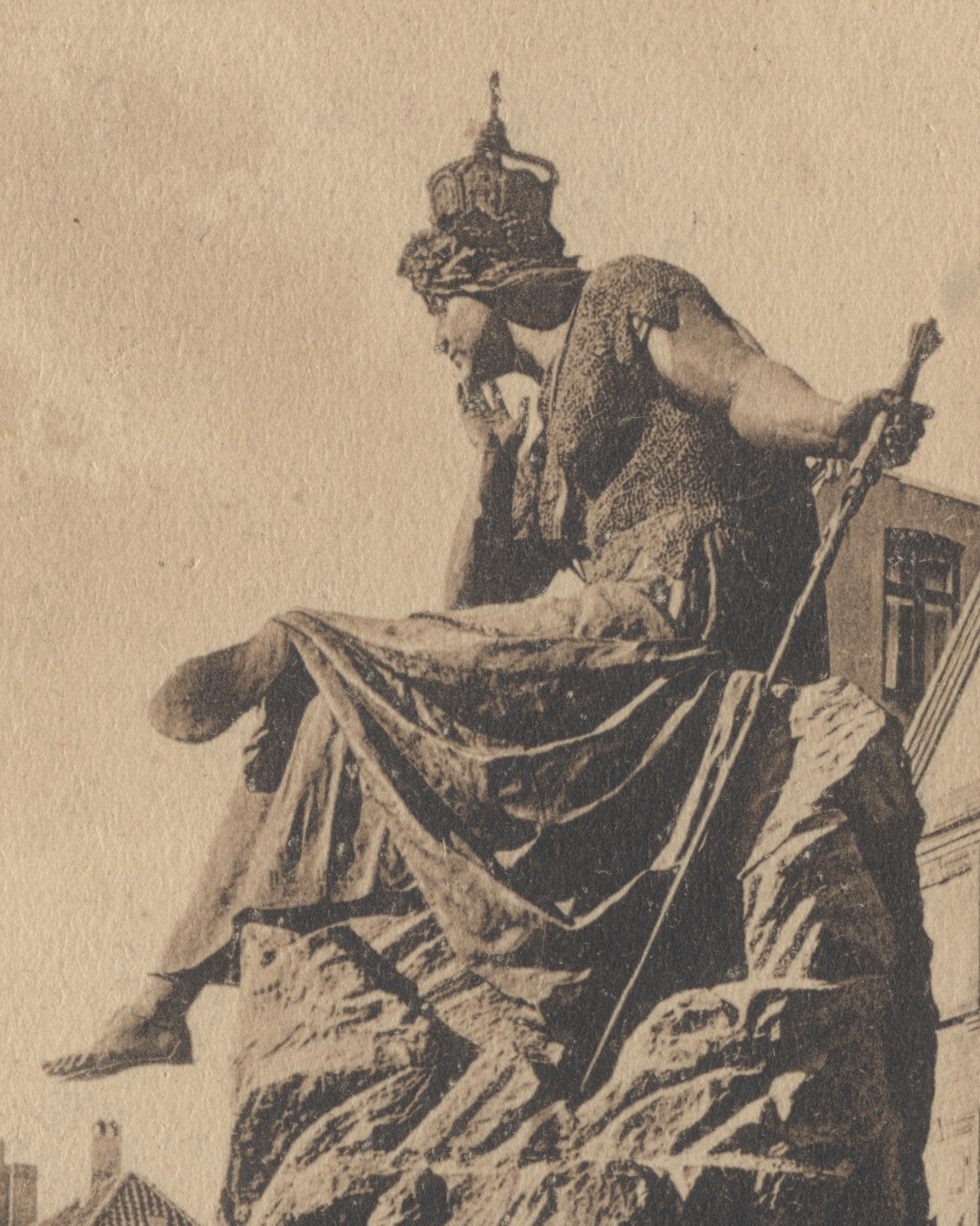 Foto Bismarckbrunnen von 1903 geerbt